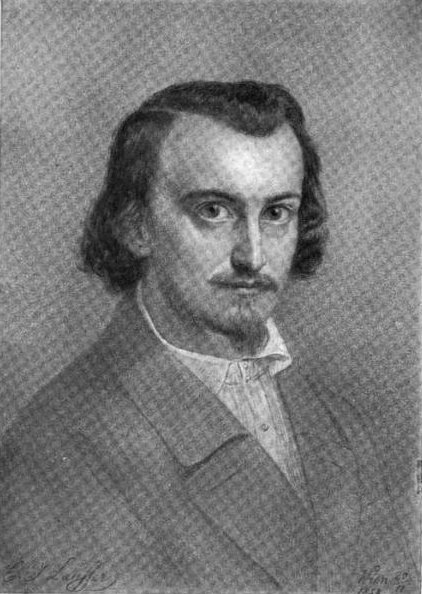 Emil Johann Lauffer (* 28. Juni 1837 in Hof; † 31. Mai 1909) war ein mährischer Maler, Universitätsprofessor und Direktor der Akademie der Bildenden Künste, Prag.